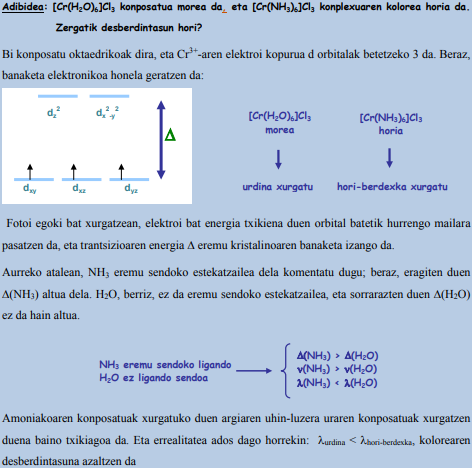 (Cr(H2O)6)Cl3 eta (Cr(NH3)6)Cl3 konposatuen arteko kolore diferentzia